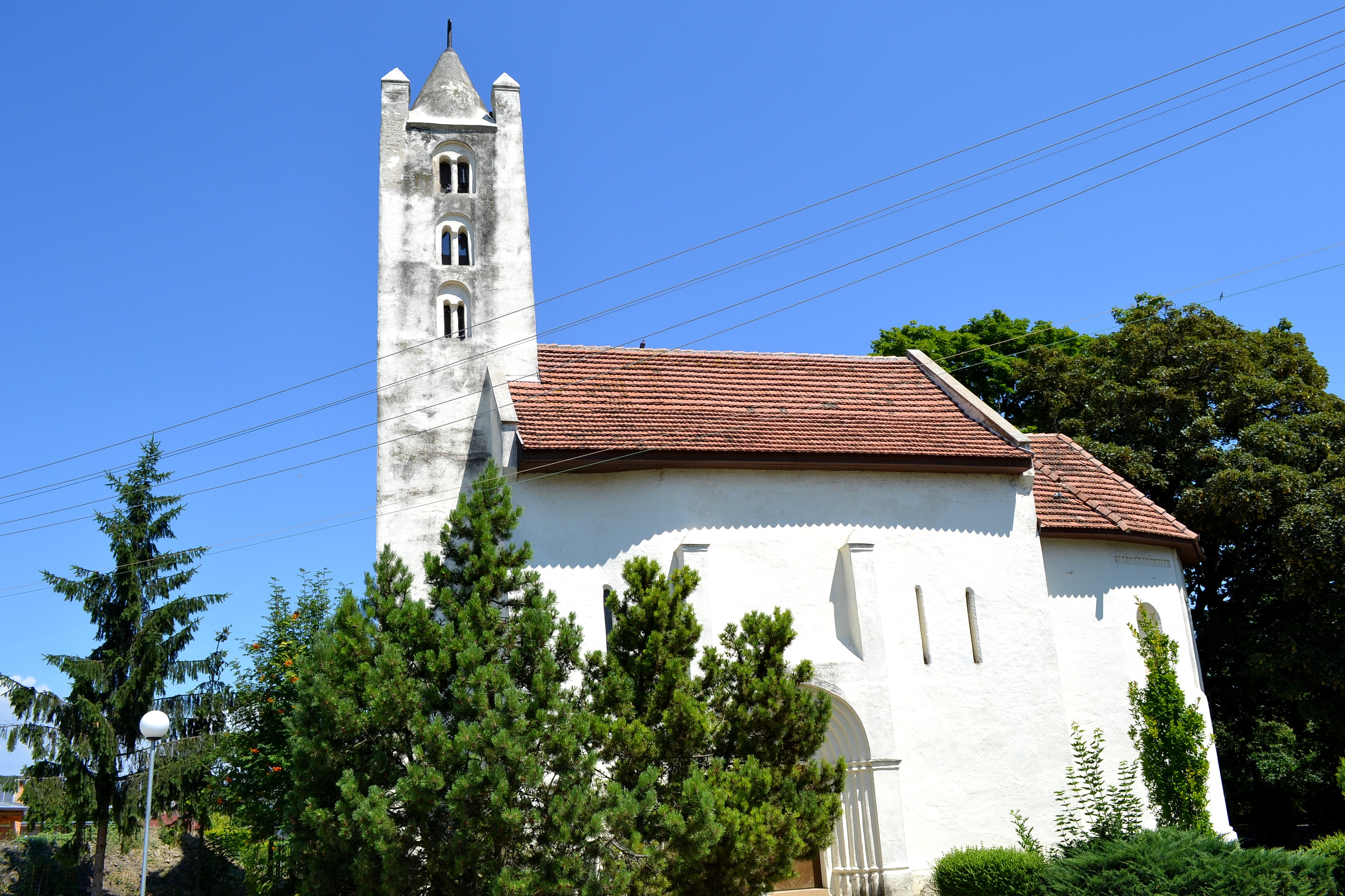 Kostol svätého Kríža v Hamuliakove, celkový pohľad od juhu